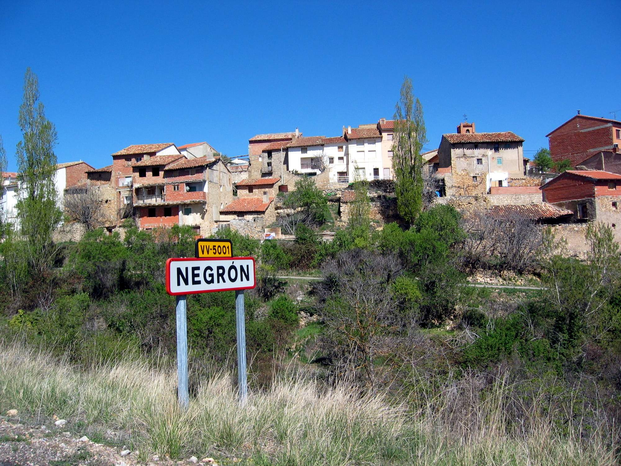 Vista parcial de Negrón, Vallanca (Valencia), desde la carretera CV-478.